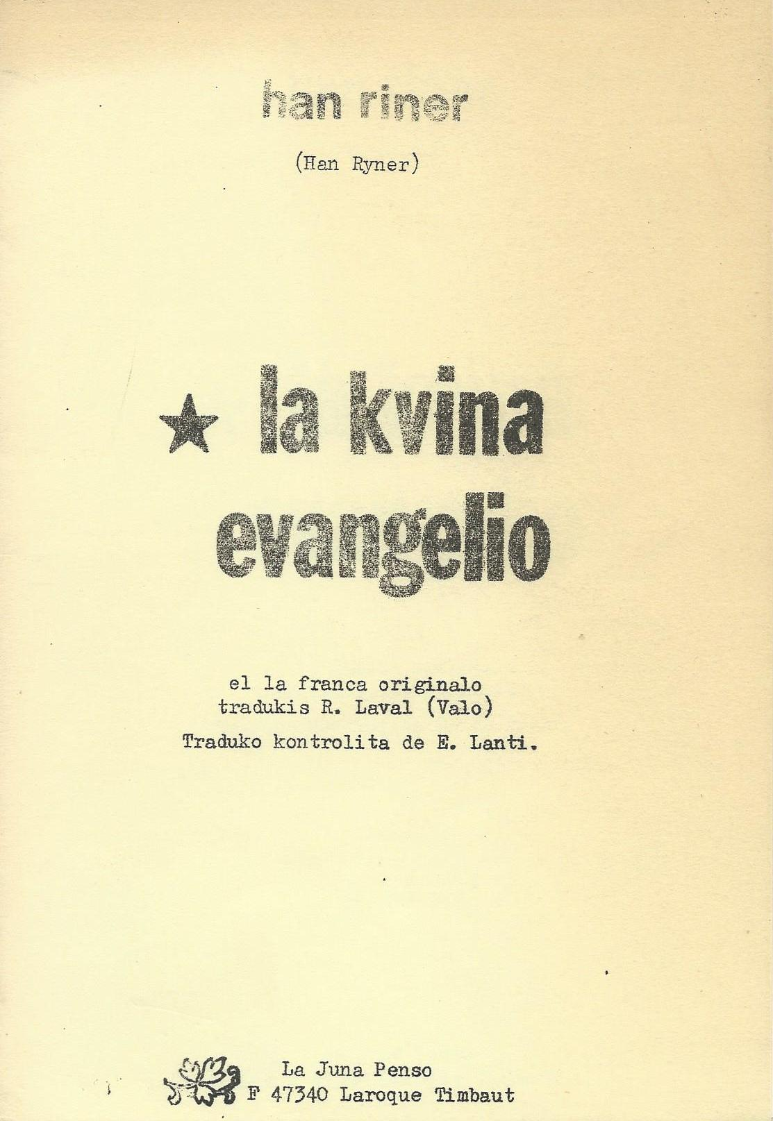 librokovrilo de "La Kvina Evangelio", 1989